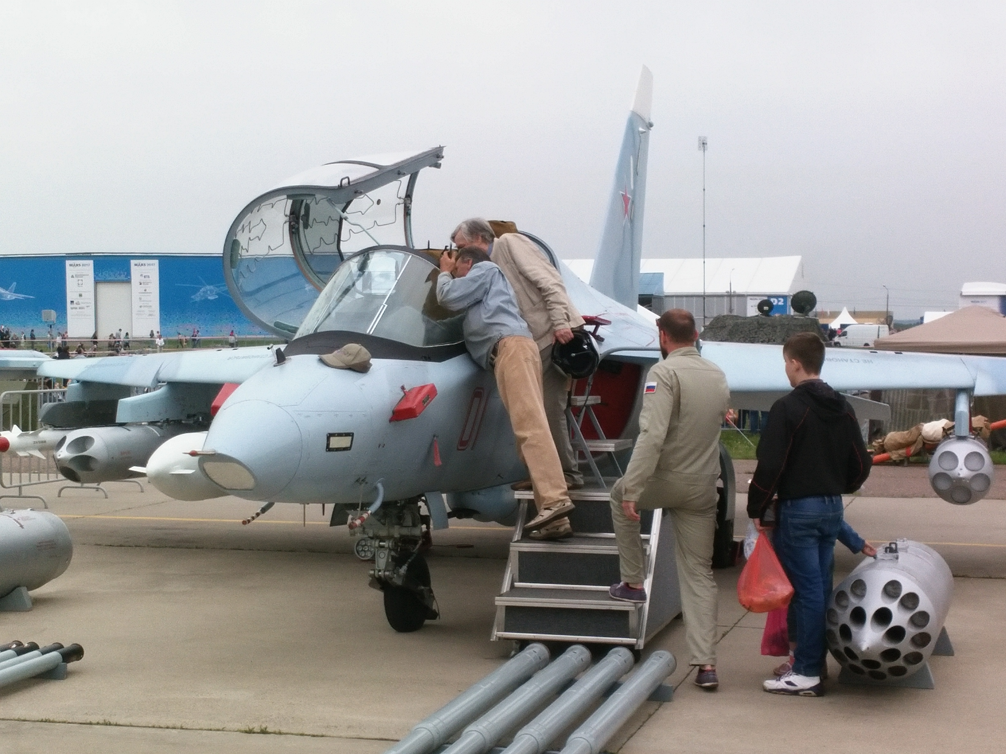 Yak130 newnose